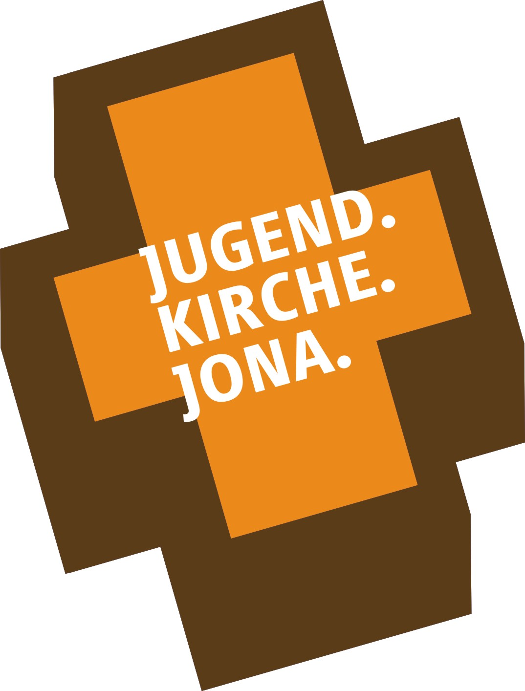 Logo der Kath. Jugendkirche JONA, Frankfurt am Main / Sachsenhausen